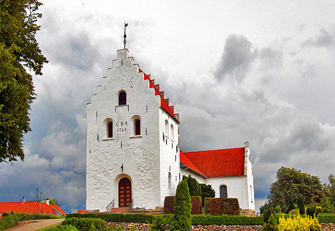 fra vest